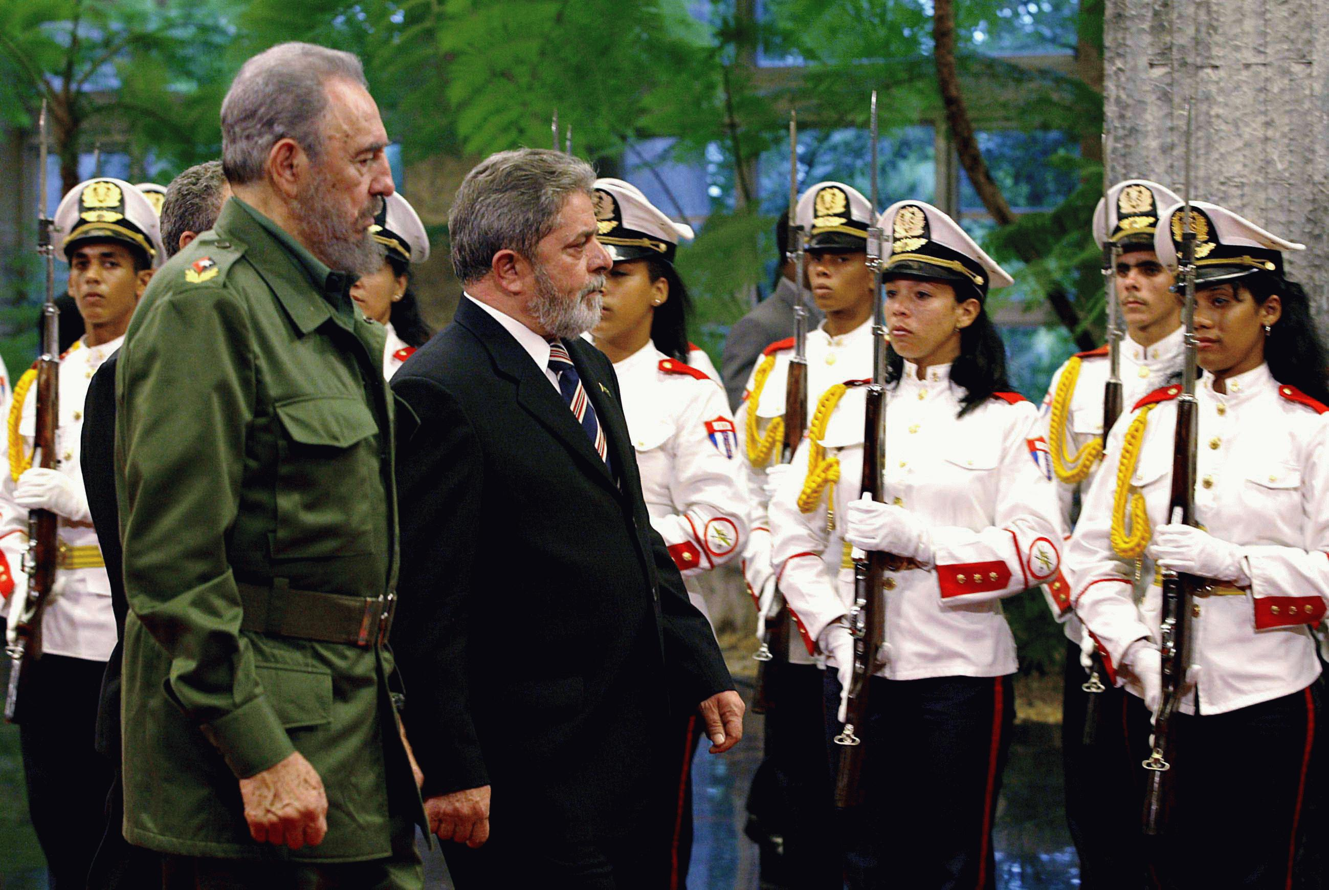 O líder cubano Fidel Castro.